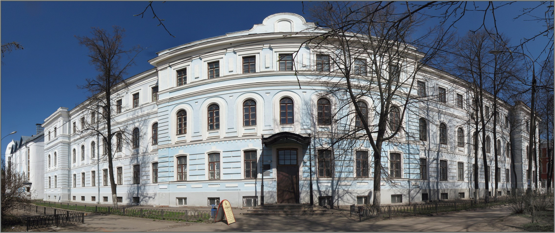 Корпус южный: набережная Которосльная, 46, Ярославль, Ярославская область